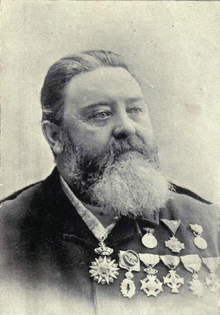 Photographie de Alexander Milton Ross